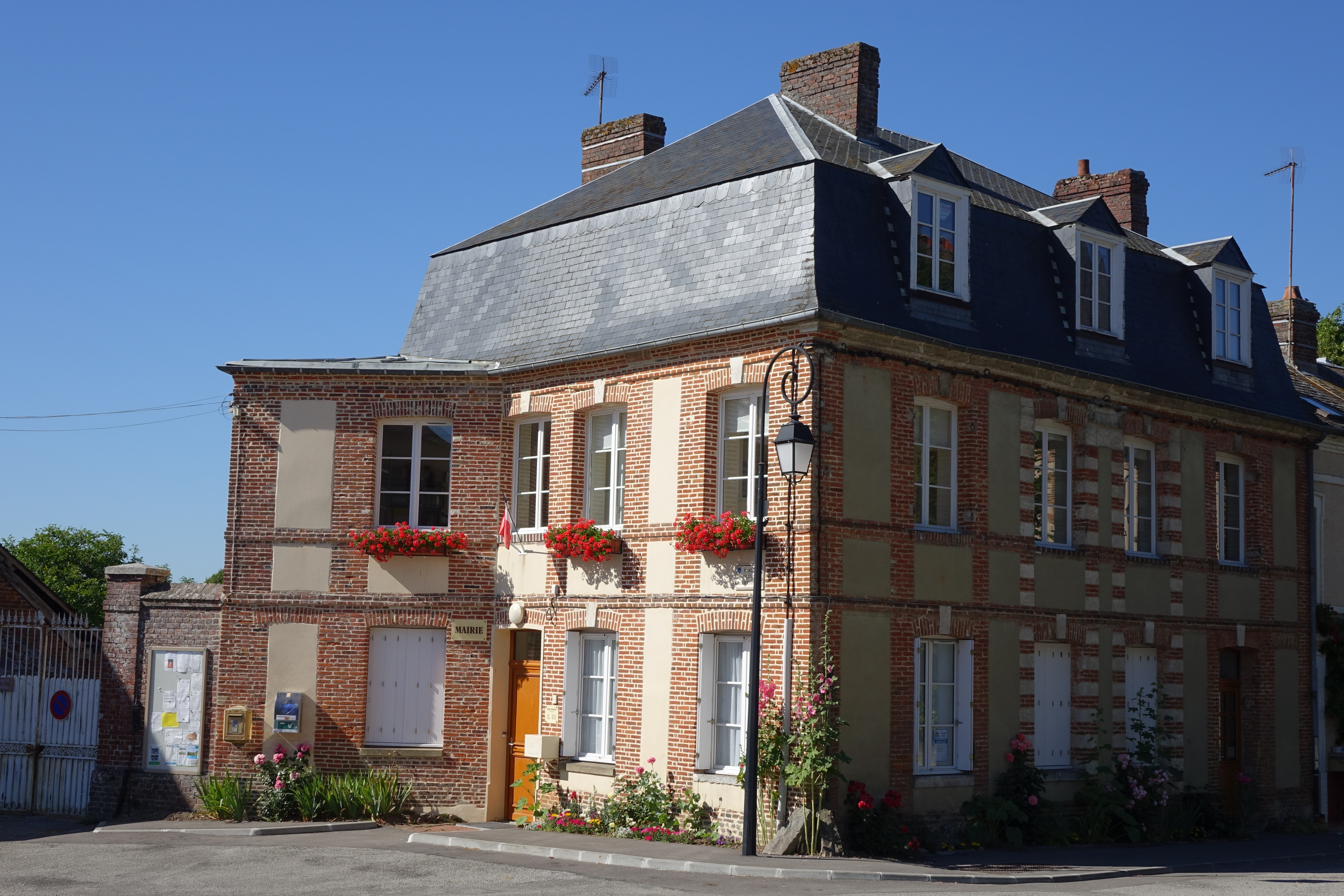 Mairie d'Argueil, Seine-Maritime, France